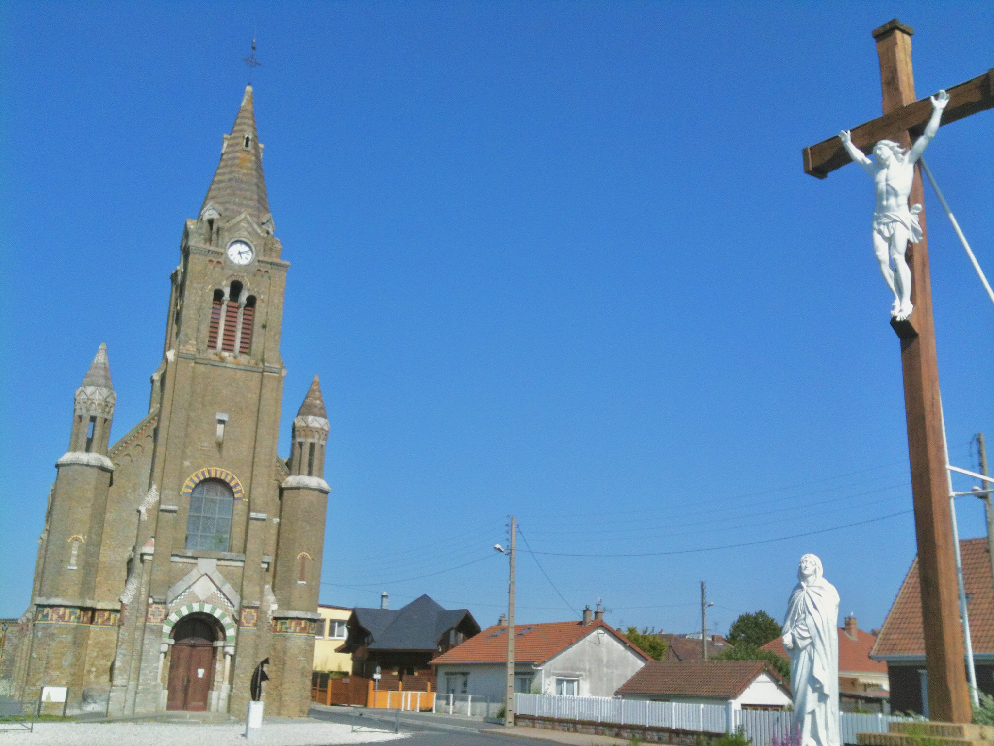 Chapelle Notre-Dame de Bon Secours de Dieppe